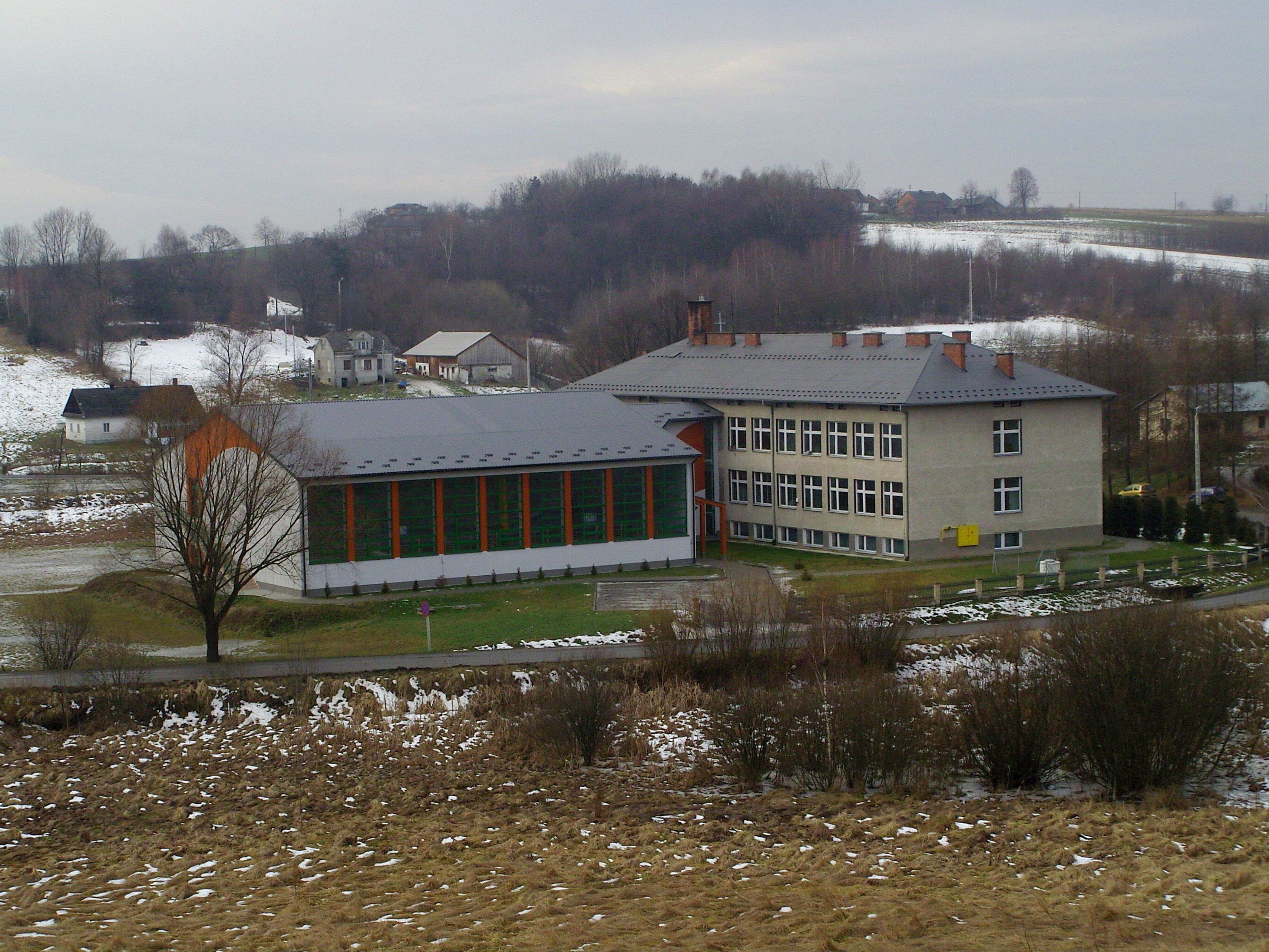 Zespół Szkół Publicznych w Bączalu Dolnym na Podkarpaciu